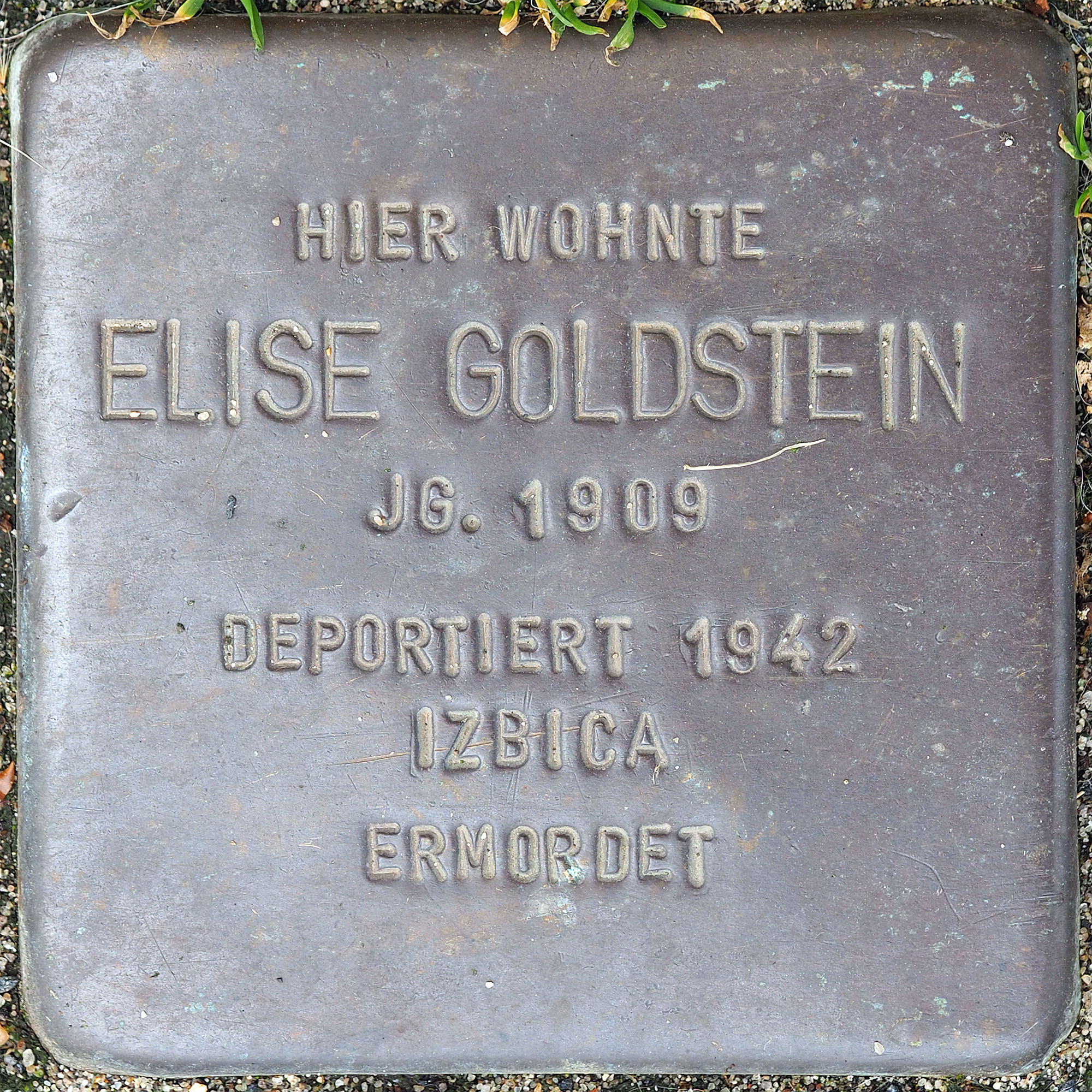 Stolpersteine MG: Goldstein, Elise